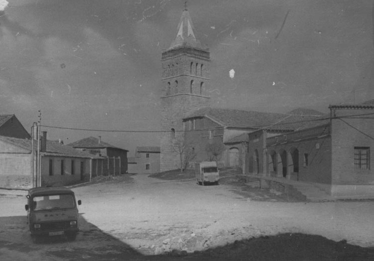 Iglesia parroquial de San Pedro - Gatón de Campos (Valladolid) - Fotografía 116 x 82 B/N